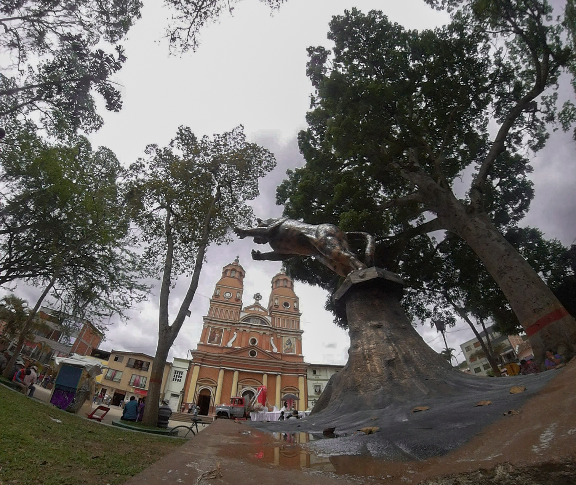 Parque Carlos Segismundo de Greiff